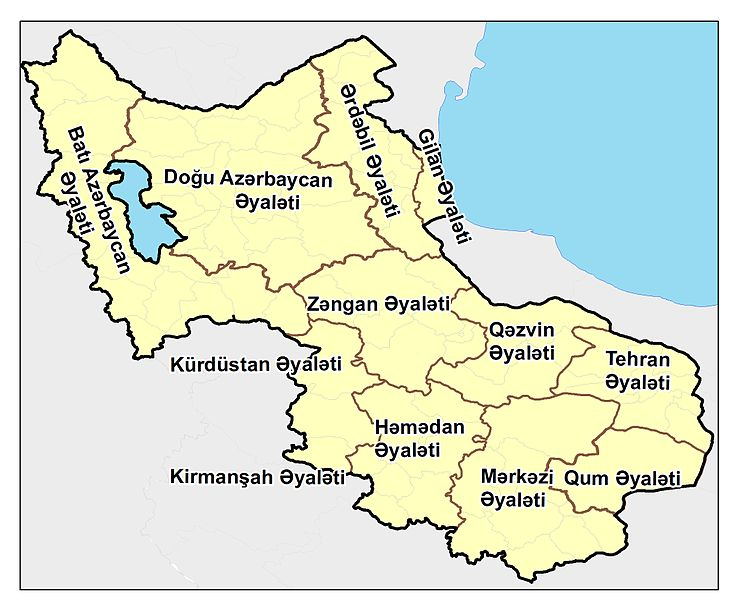 Güney Azərbaycan xəritəsi